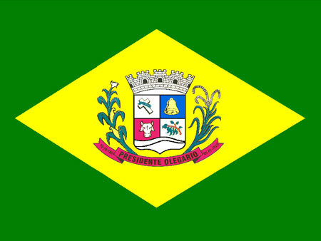 Bandeira do município de Presidente Olegário, MG., Brasil.